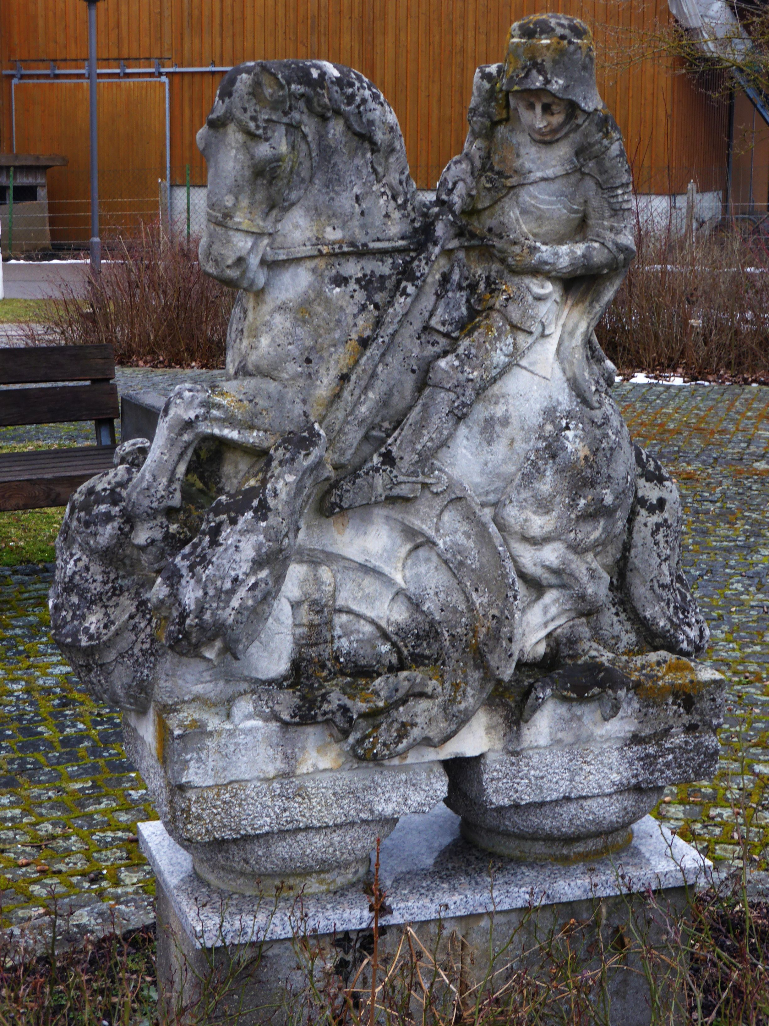 Hl. Georg vor dem Rathaus in Mintraching